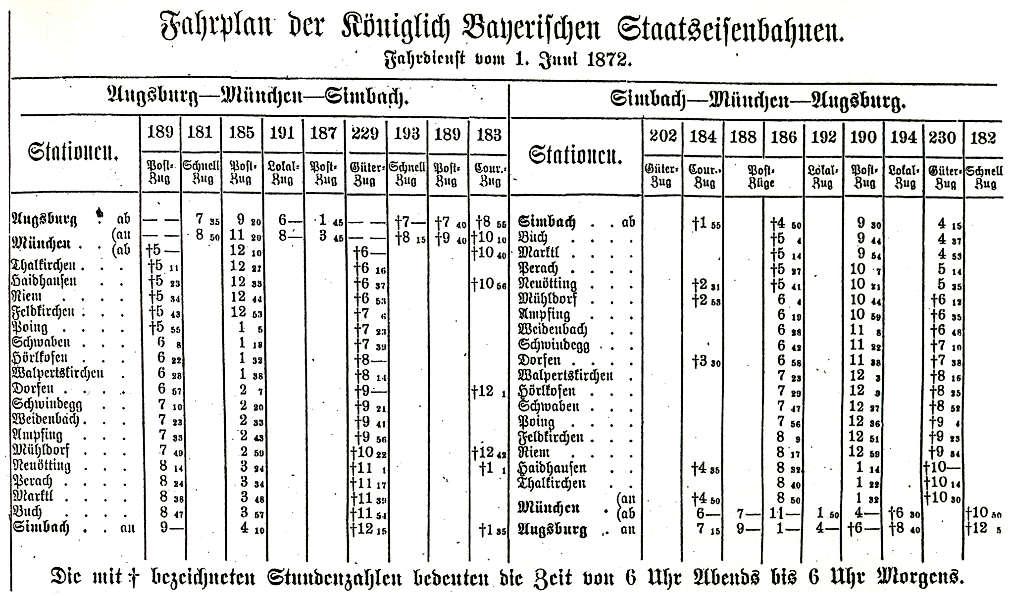 Fahrplan der Königlich Bayerischen Staatseisenbahnen für die Strecke Augsburg–München–Simbach, gültig ab 1. Juni 1872